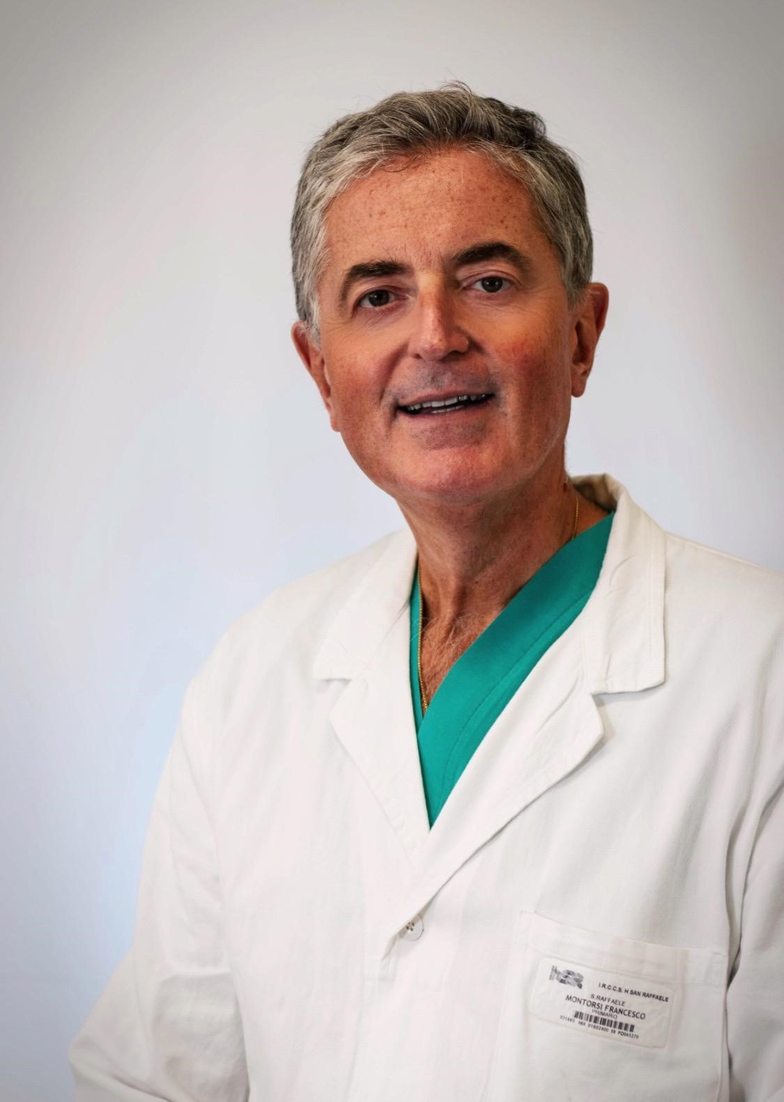 Francesco Montorsi